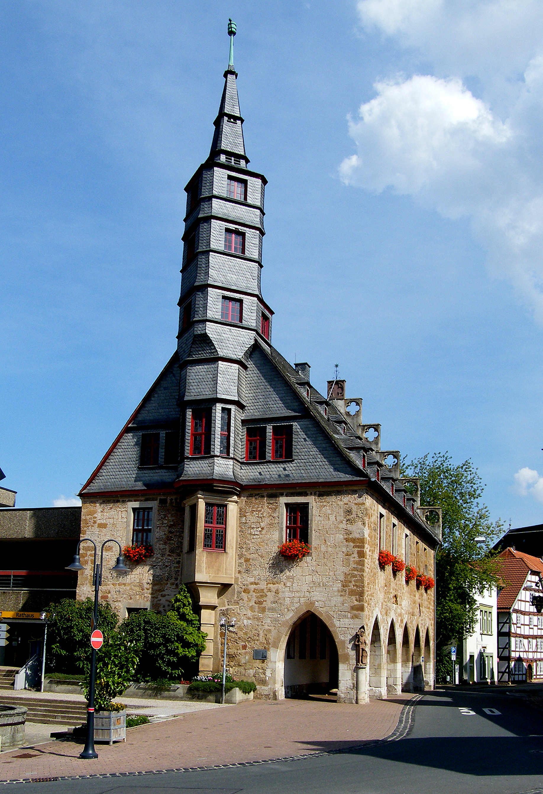 Rathaus (Town Hall) Kreisstadt Korbach, Stechbahn auf der Grenze Altstadt/Neustadt (Erbaut 1377)